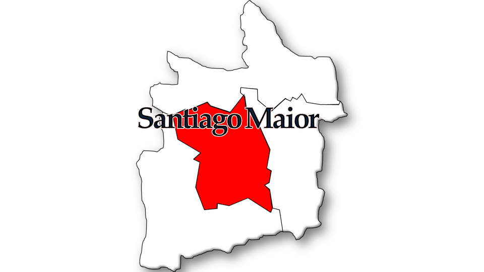 Evolução da População